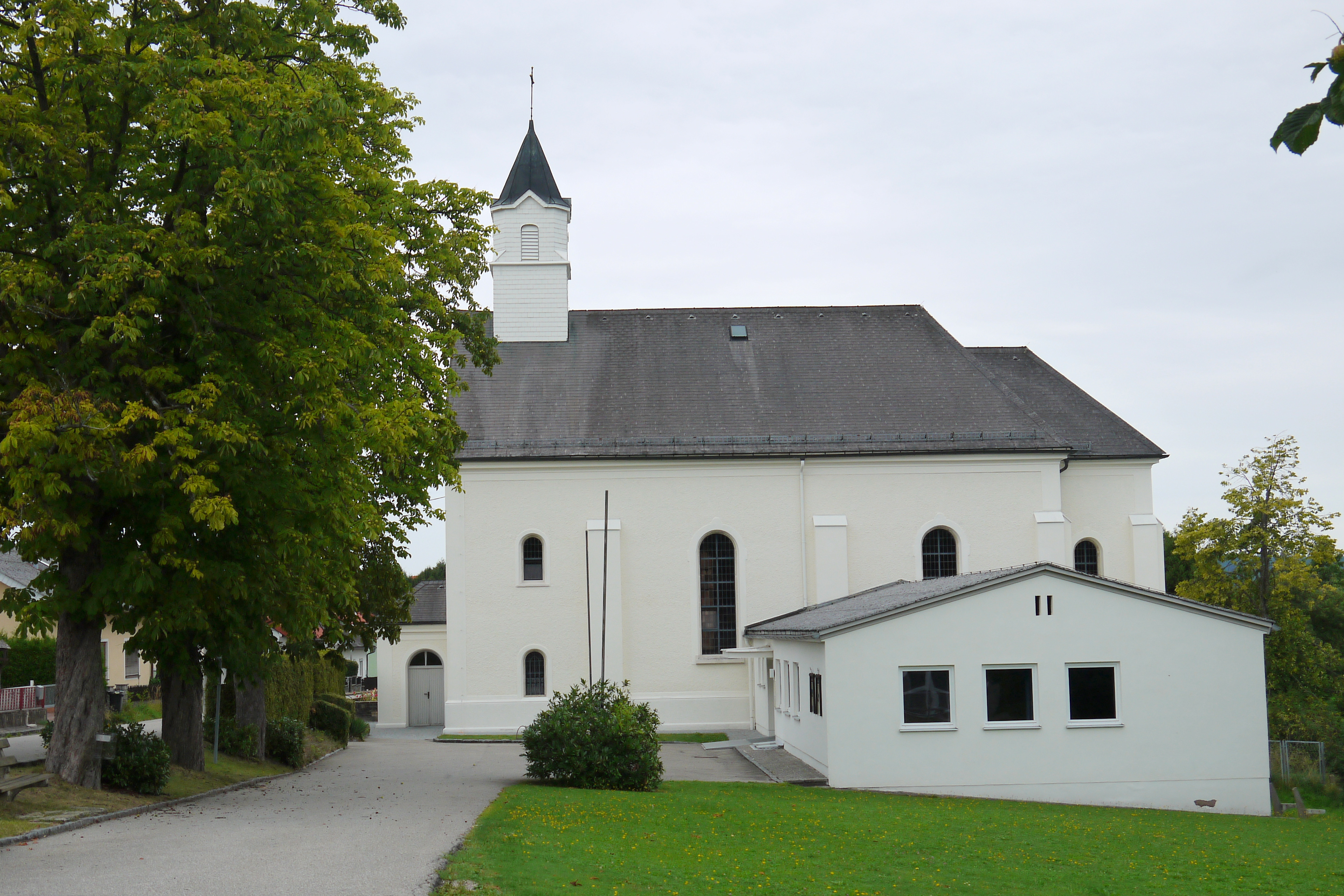 Kath. Filialkirche, Barbarakirche, Bergmannskirche